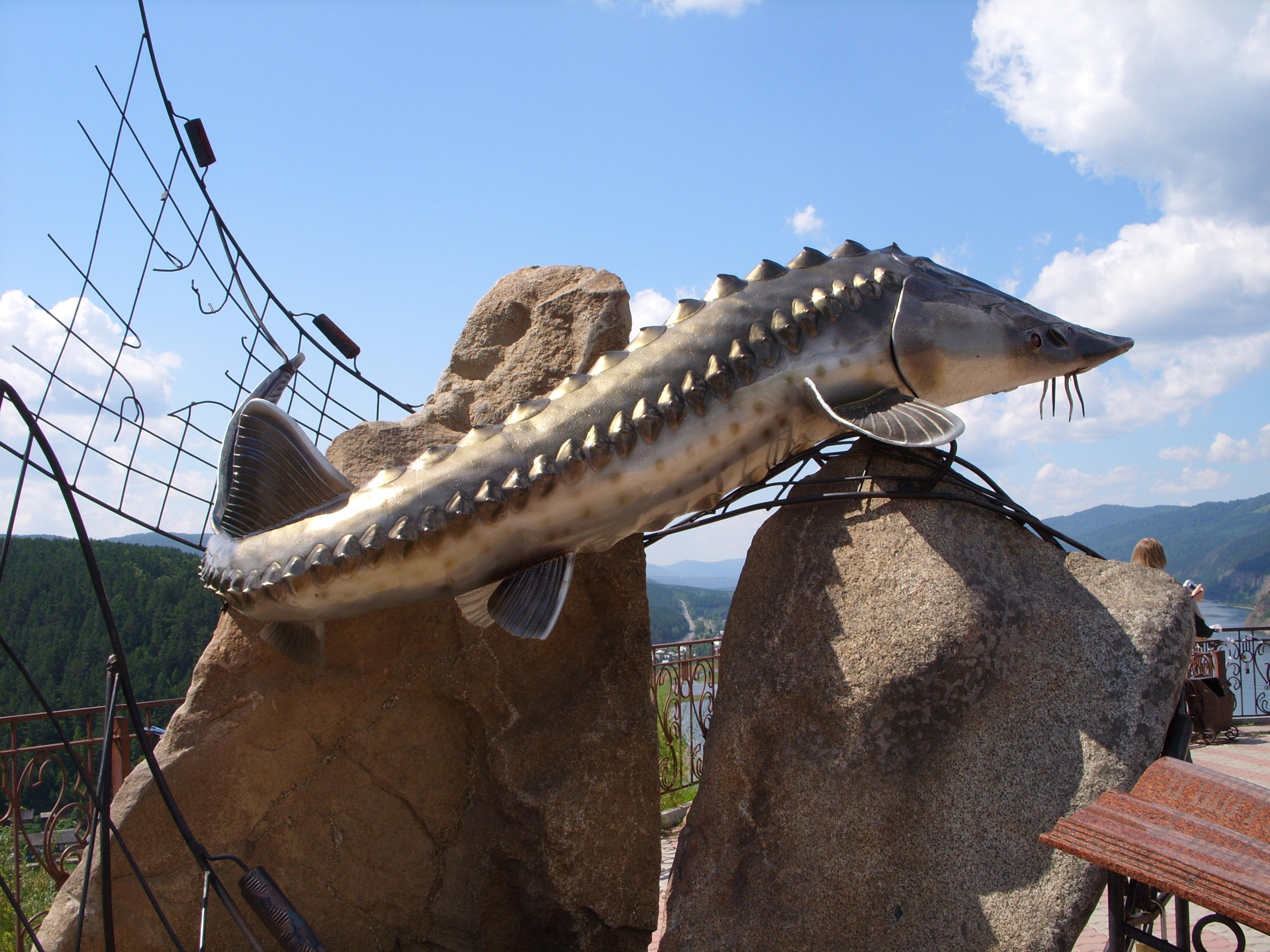 снимки июля 2008 г.